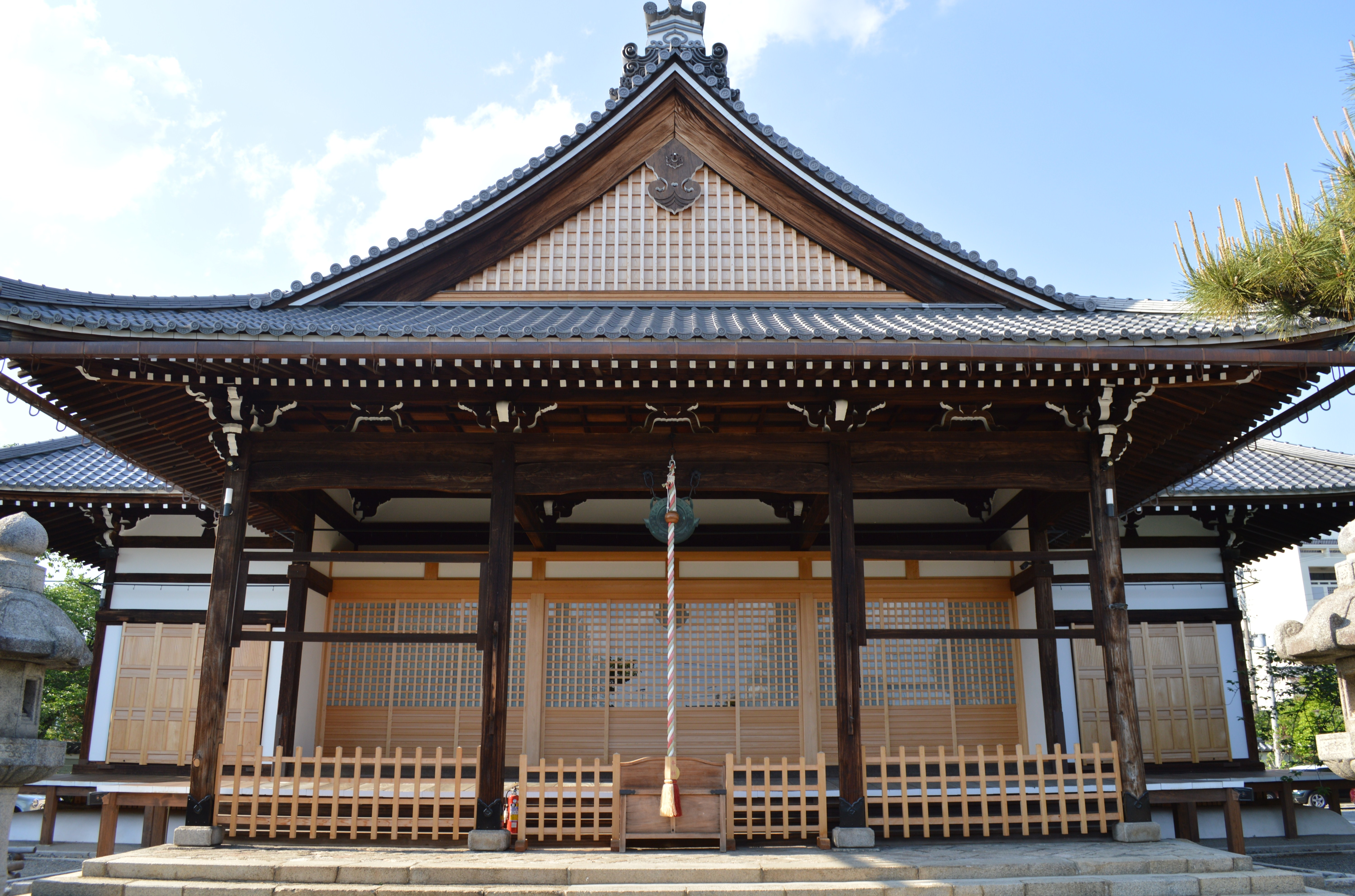 京都府京都市上京区妙蓮寺前町 本門法華宗大本山妙蓮寺 本堂